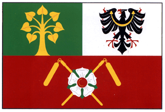 Česky: vlajka obce Sušice